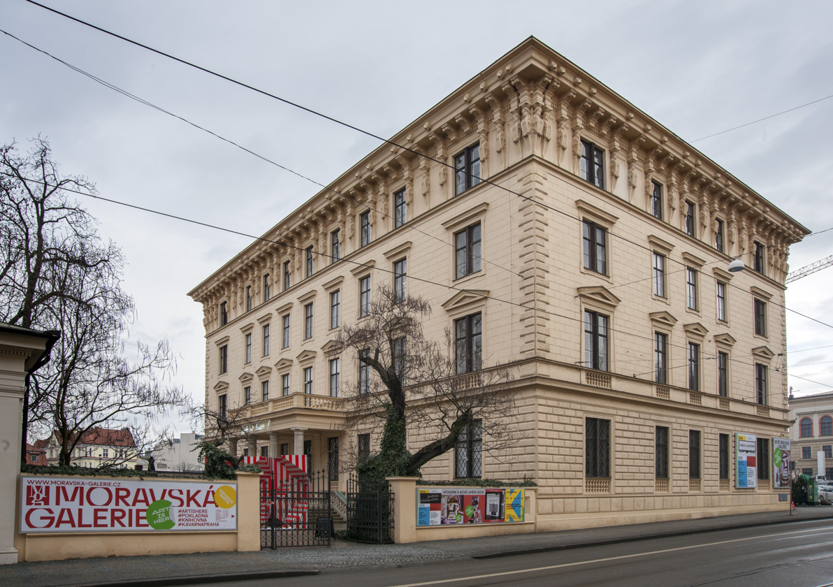 Pražákův palác Moravské galerie v Brně (Husova 18)